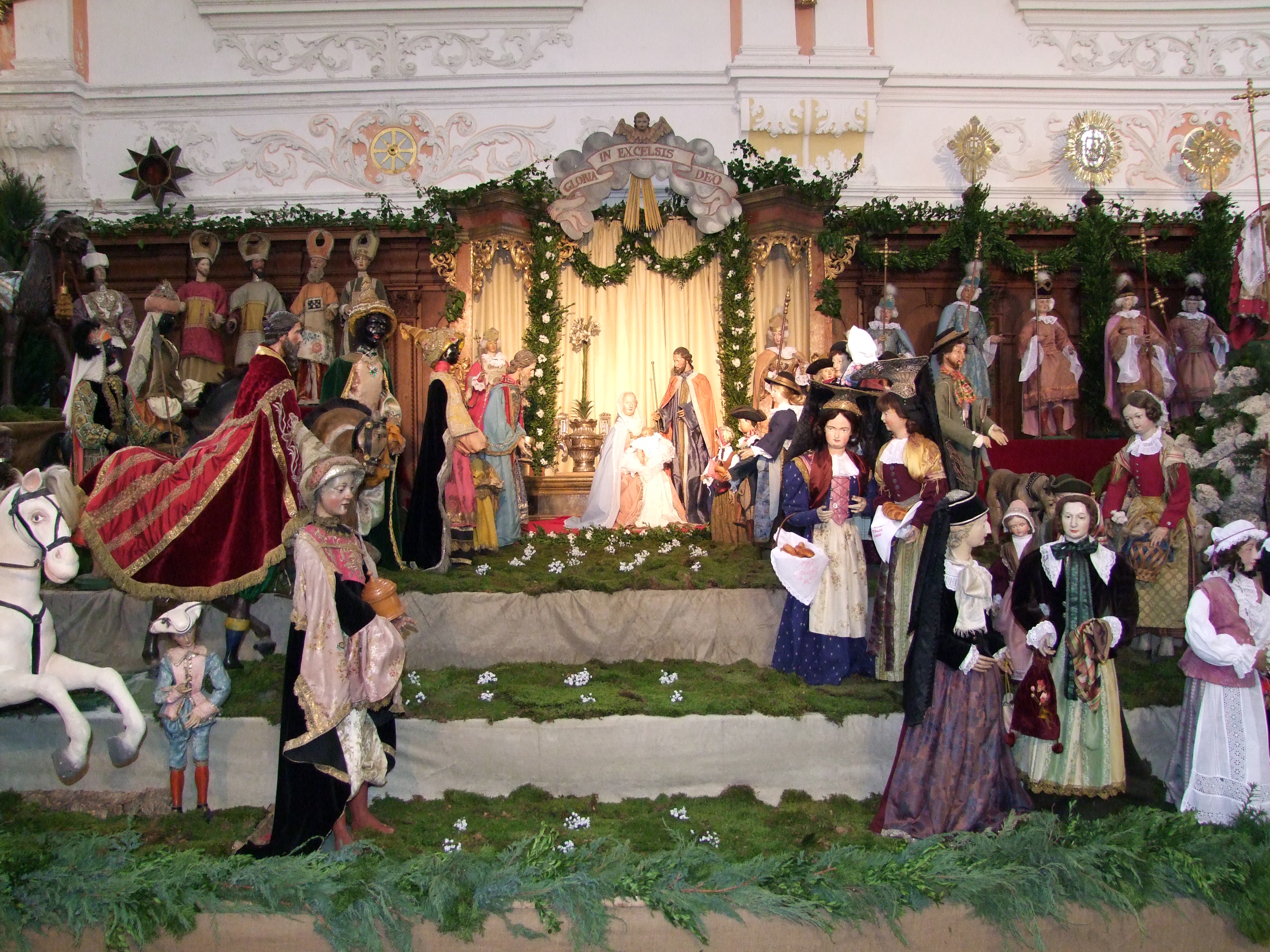 Barockkrippe in der Jesuitenkirche "Mariä Verkündigung" im oberschwäbischen Mindelheim.